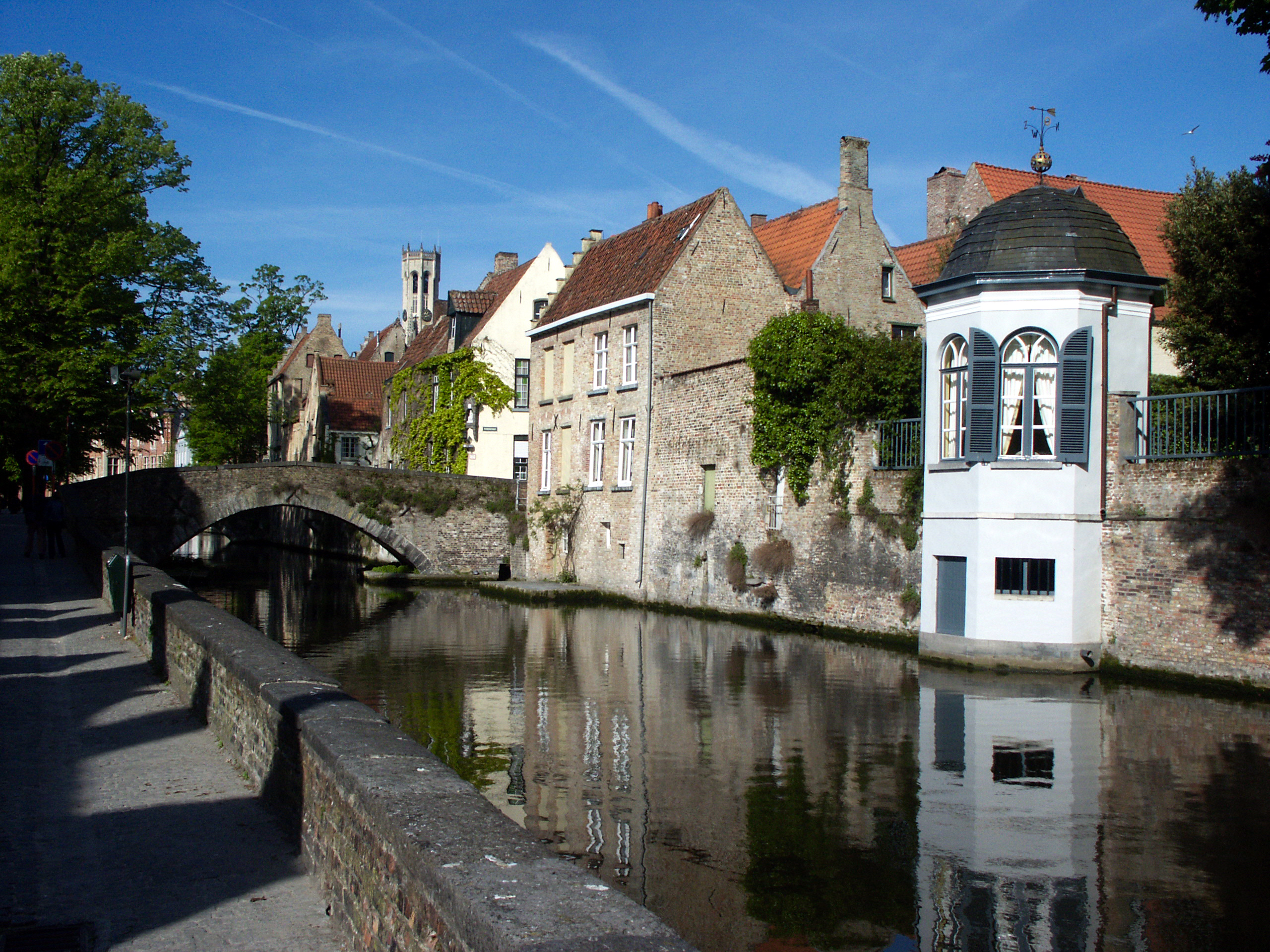 Vue d'un canal à Brugge